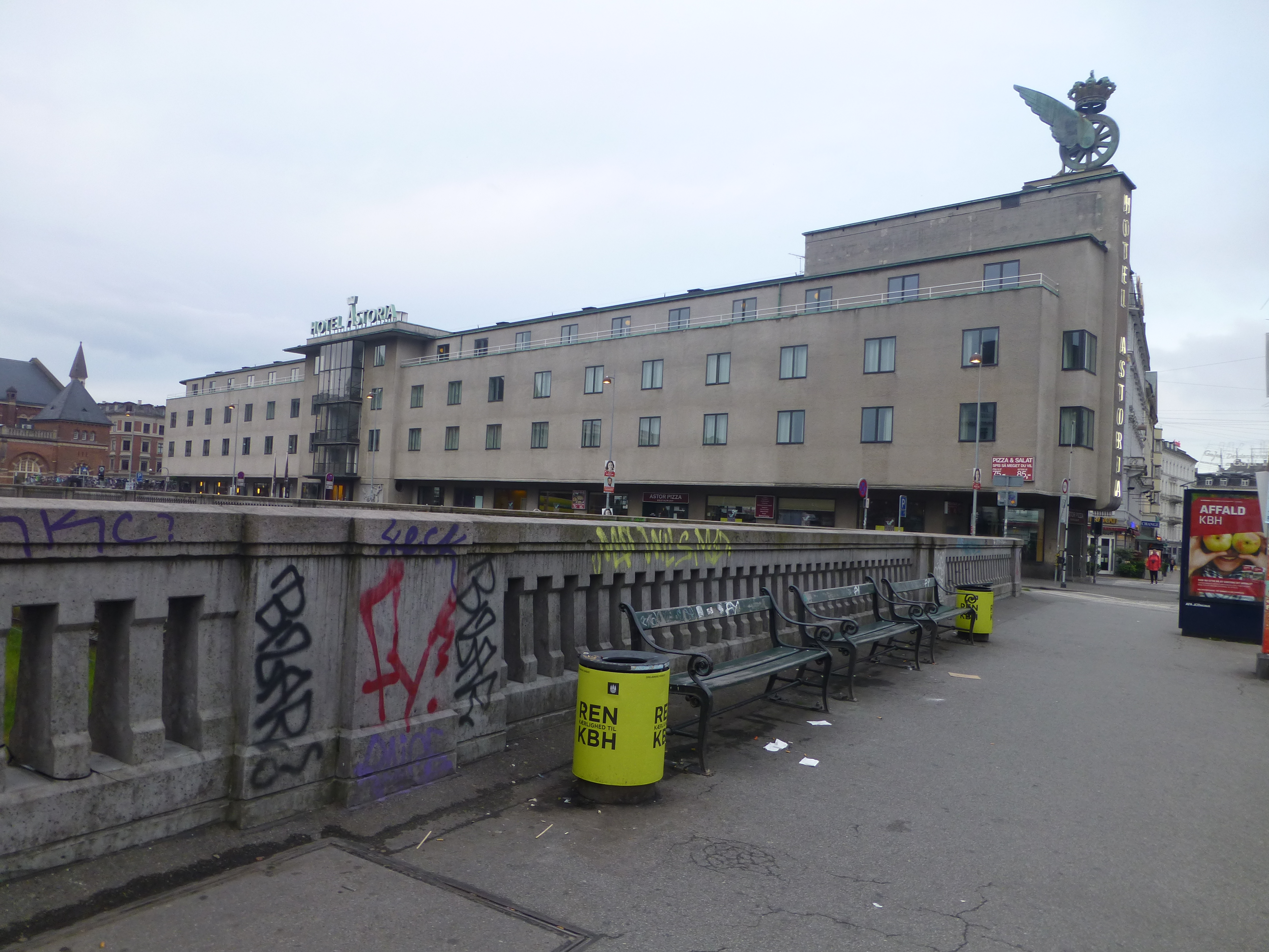 Hotel Astoria in Copenhagen, Denmark